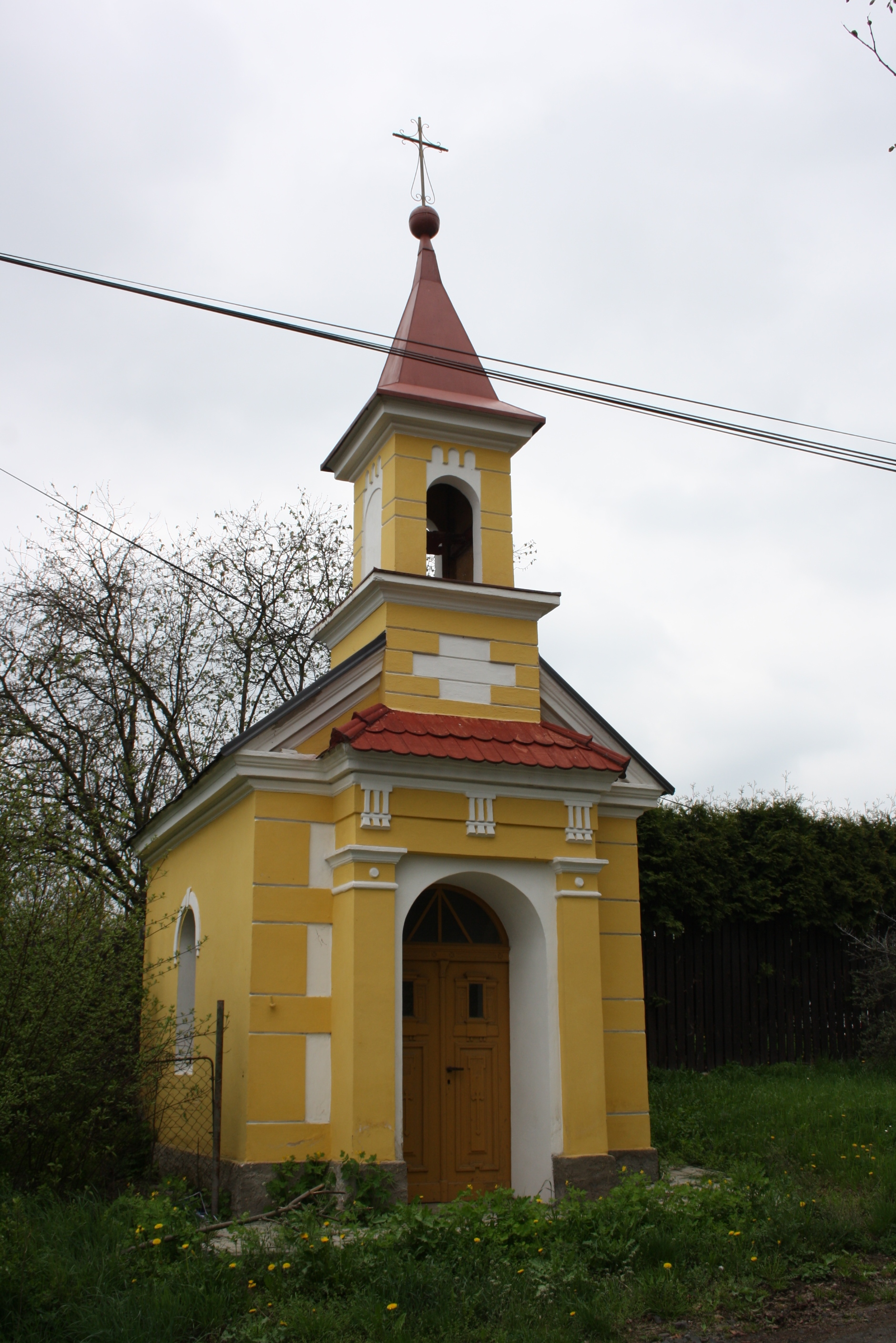 Kaplička v Dolních Řepčicích, části Liběšic.